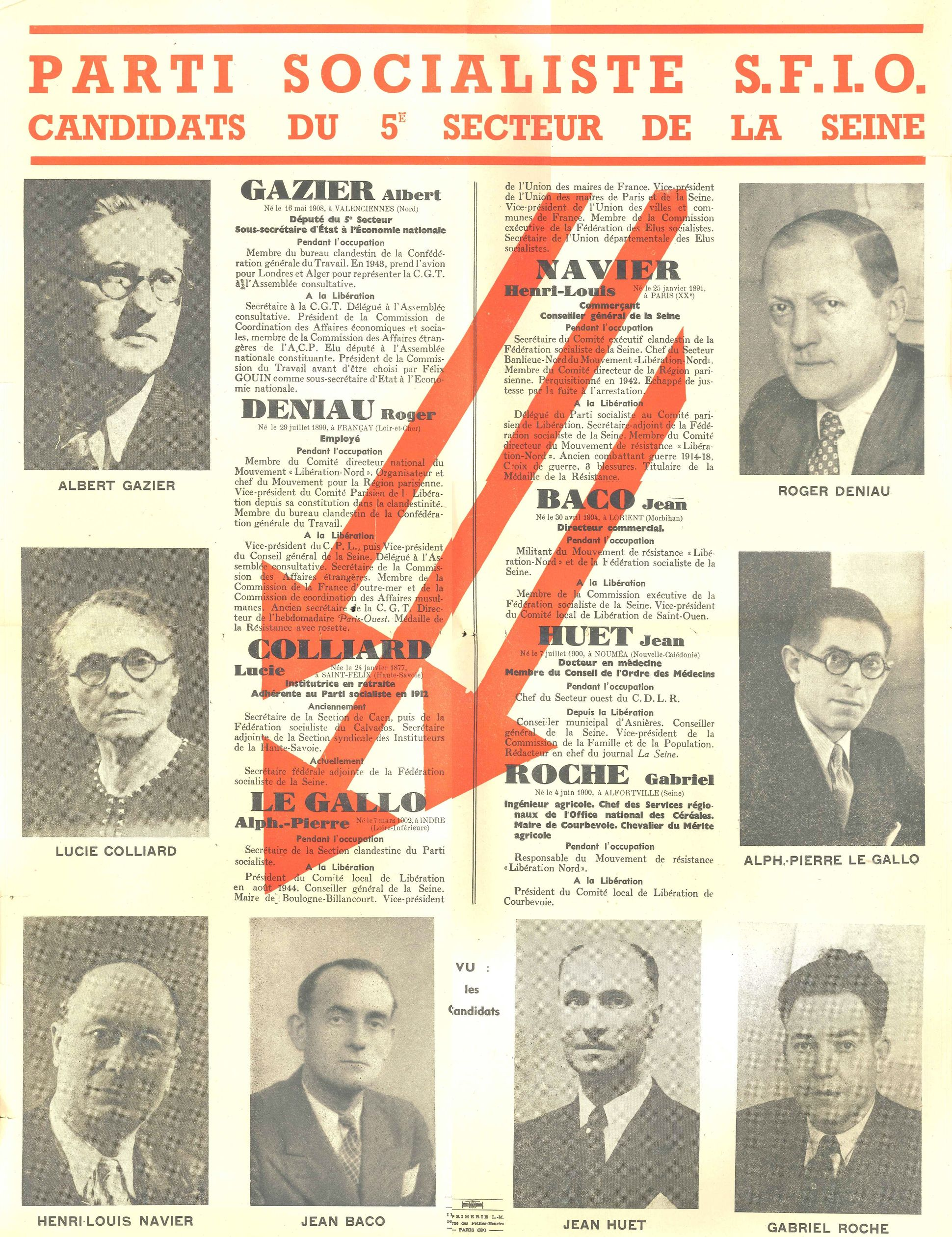 Affiche illustrée (photographies et biographies) des candidats SFIO du 5e secteur de la Seine pour les élections législatives de 1946. Affiche conservée aux archives de Boulogne-Billancourt, 3 Fi 2987.